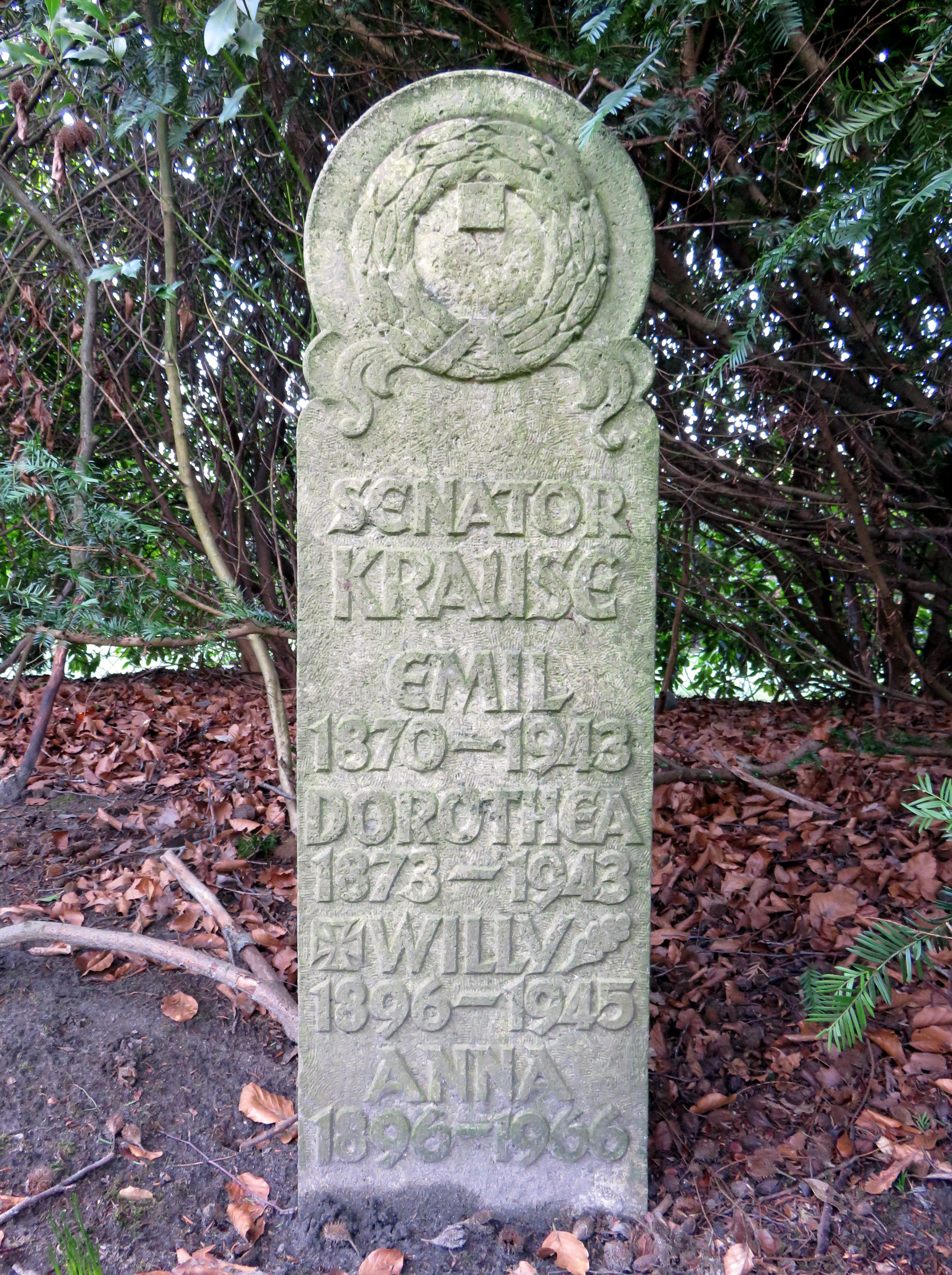 Grab des deutschen Politikers, Reformpädagogen und Hamburger Schulsenators Emil Krause, Friedhof Ohlsdorf, Planquadrat AA 29 (südwestlich Kapelle 6).